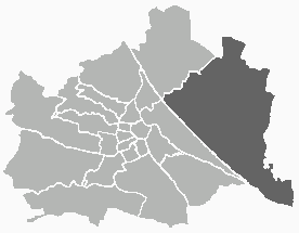 Positionskarte des 22. Wiener Gemeindebezirks Unter Verwendung einer Vorlage von Extrawurst. Public Domain.